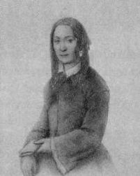 Caterina Franceschi Ferrucci, auto-portrait, dessin